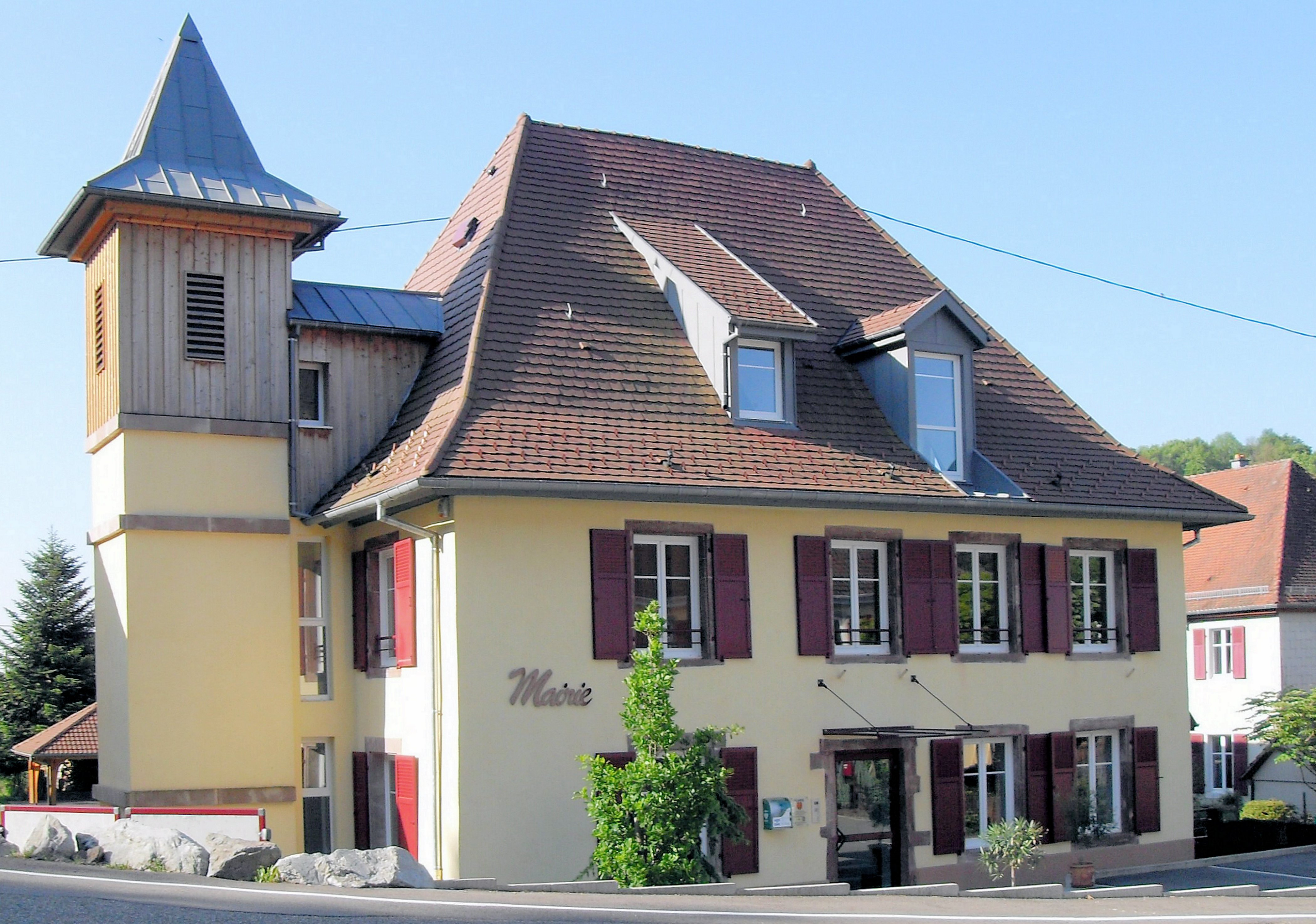 La mairie de Bourbach-le-Bas